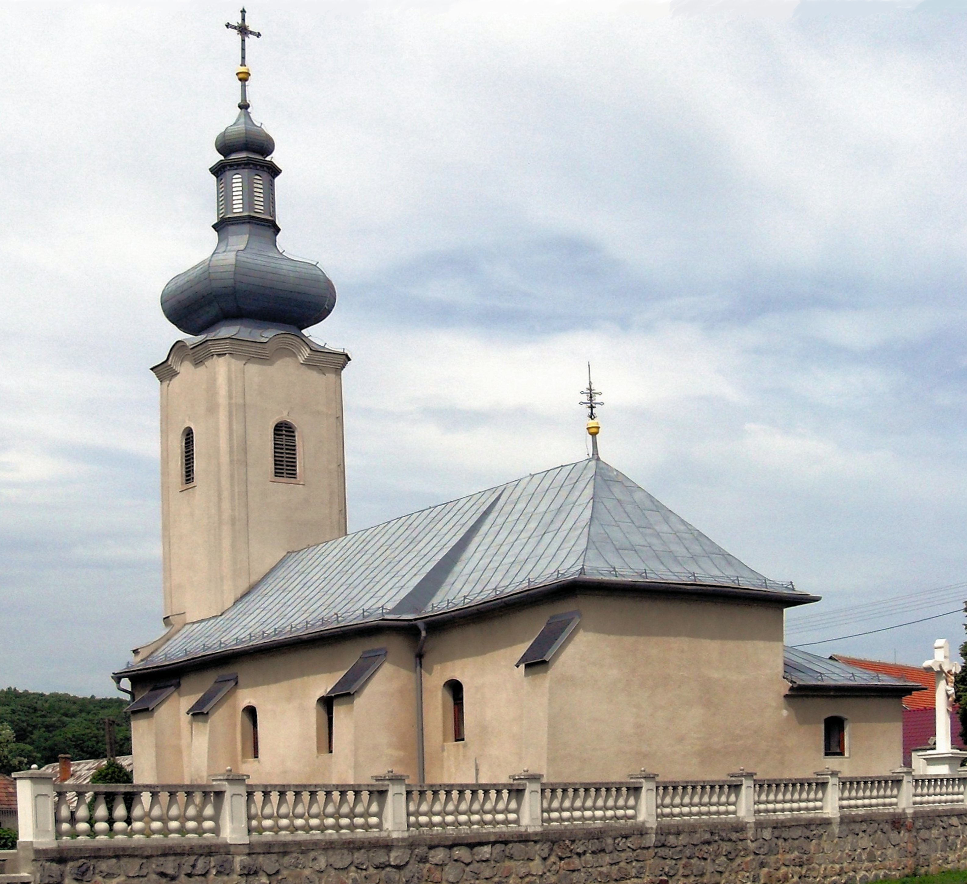 Paňovce, Rímskokatolícky kostol sv. Kataríny Alexandrijskej